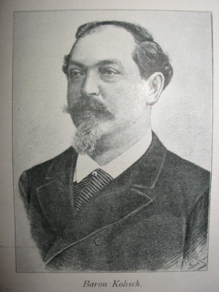 Fotografie aus dem 19. Jahrhundert, gemeinfrei.